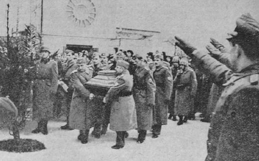 Pogreb Dušana Meničanina